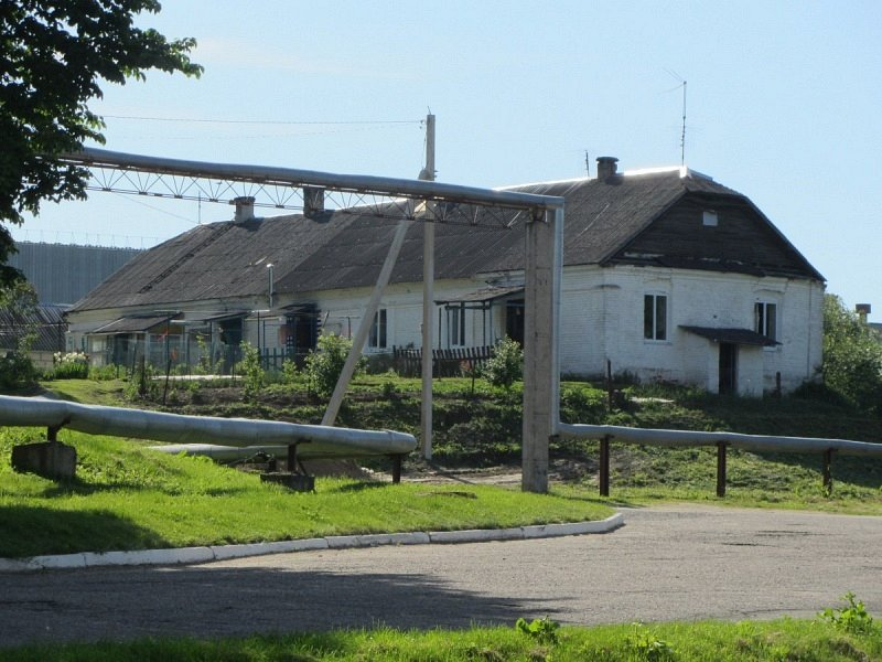 Маліноўшчына. Палаца-паркавы ансамбль Свентаржэцкіх. Жылы дом